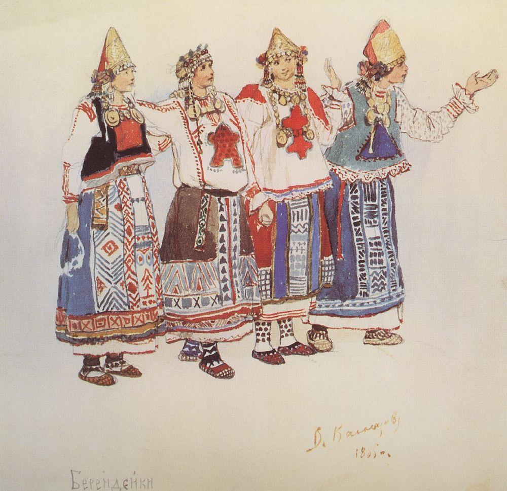 Берендейки